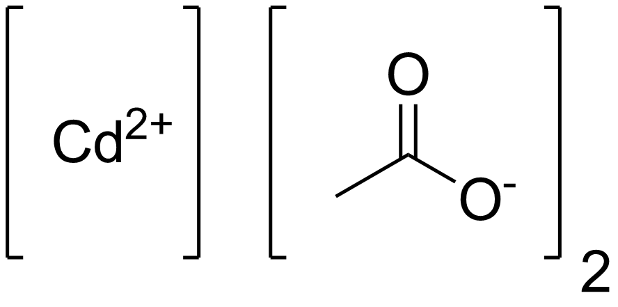 chemical structure of cadmium acetate